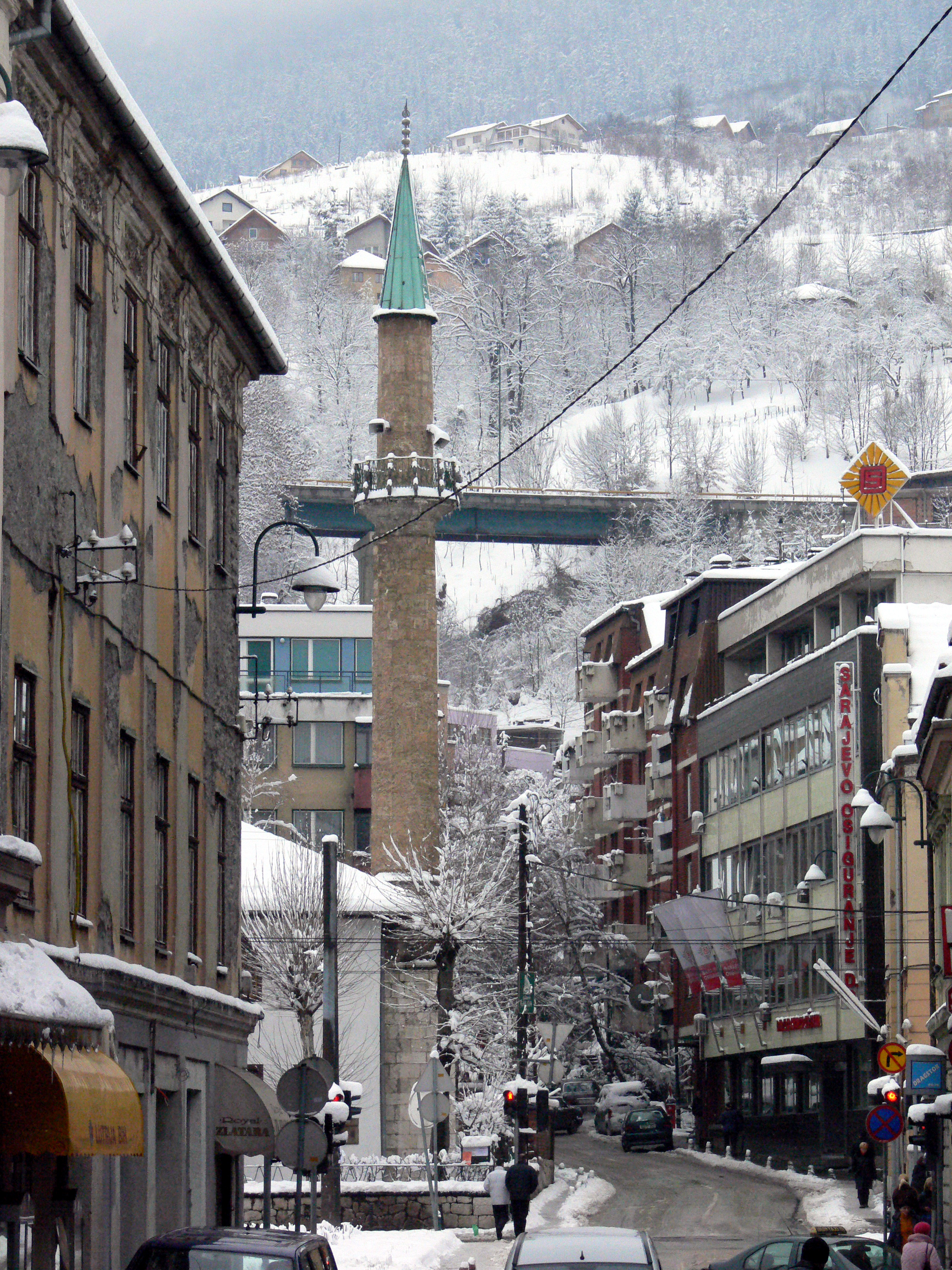 The Cobanija Mosque in Sarajevo.